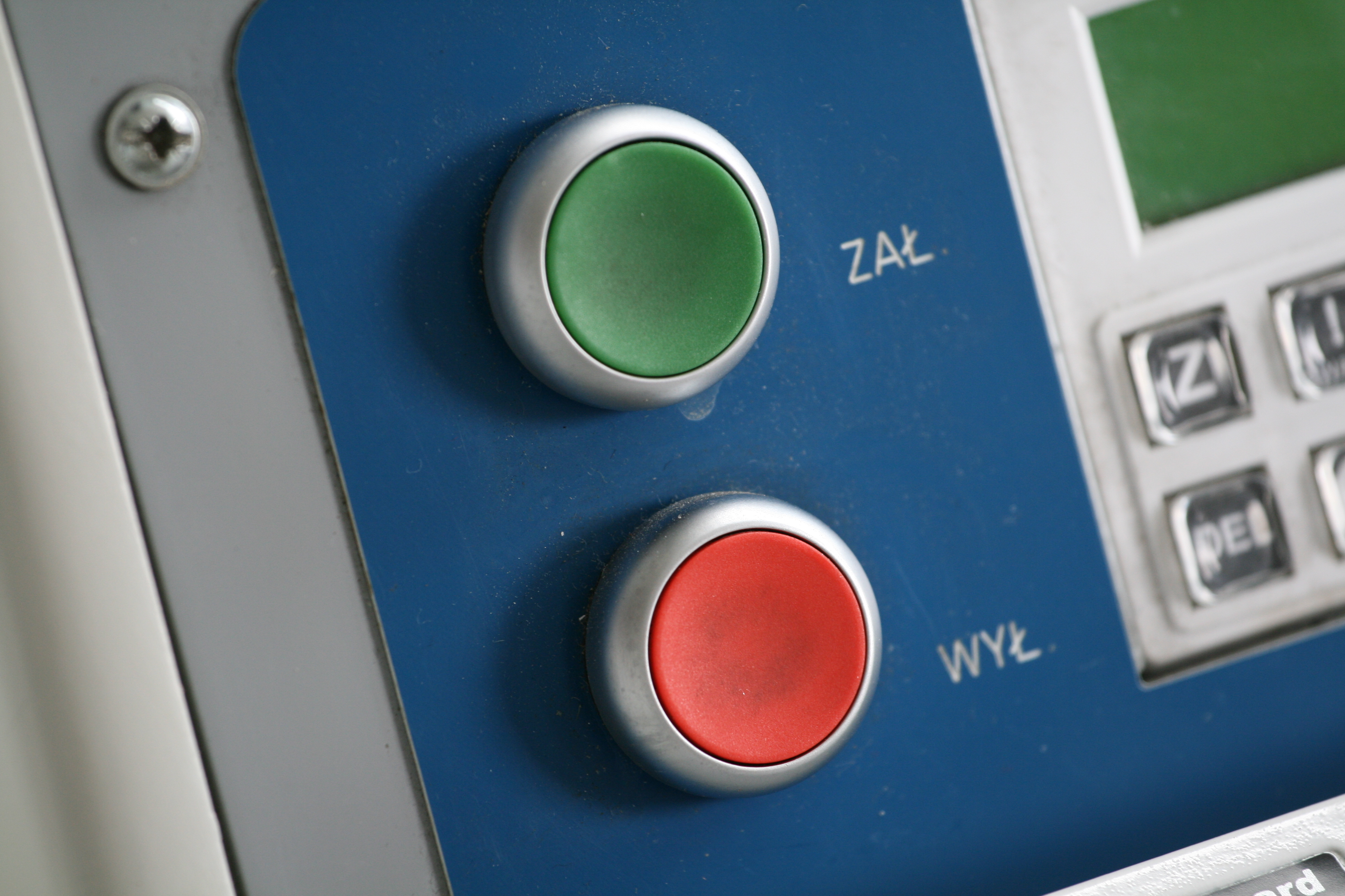 On/Off - Zał/Wył